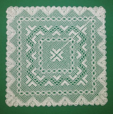 TorchonLace(replica) トーションレース(レプリカ)